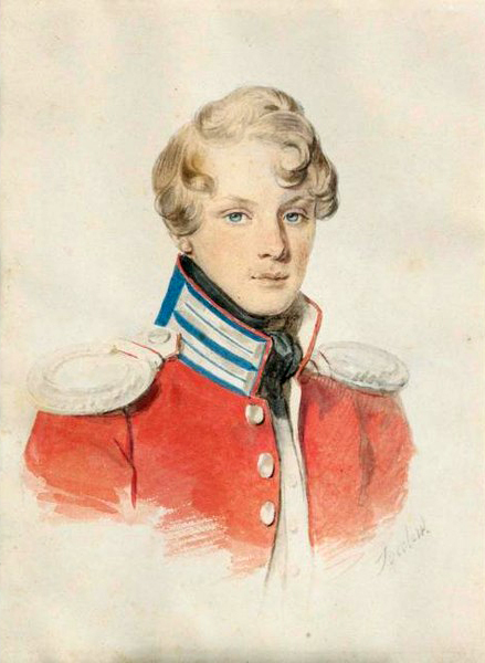 Павел Карлович Ферзен (1800-1884), граф, внук И.Е.Ферзена (1739-1800); с 1829 года муж графини О.П.Строгановой.